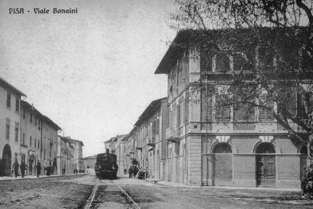 Pisa, viale Bonaini con tram diretto a Pontedera